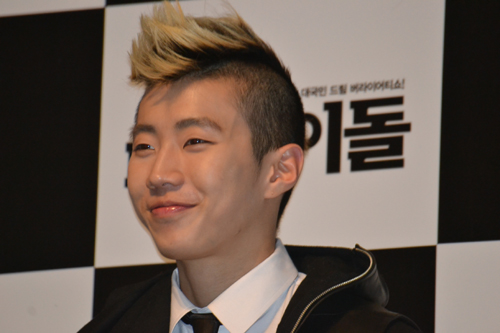 박재범